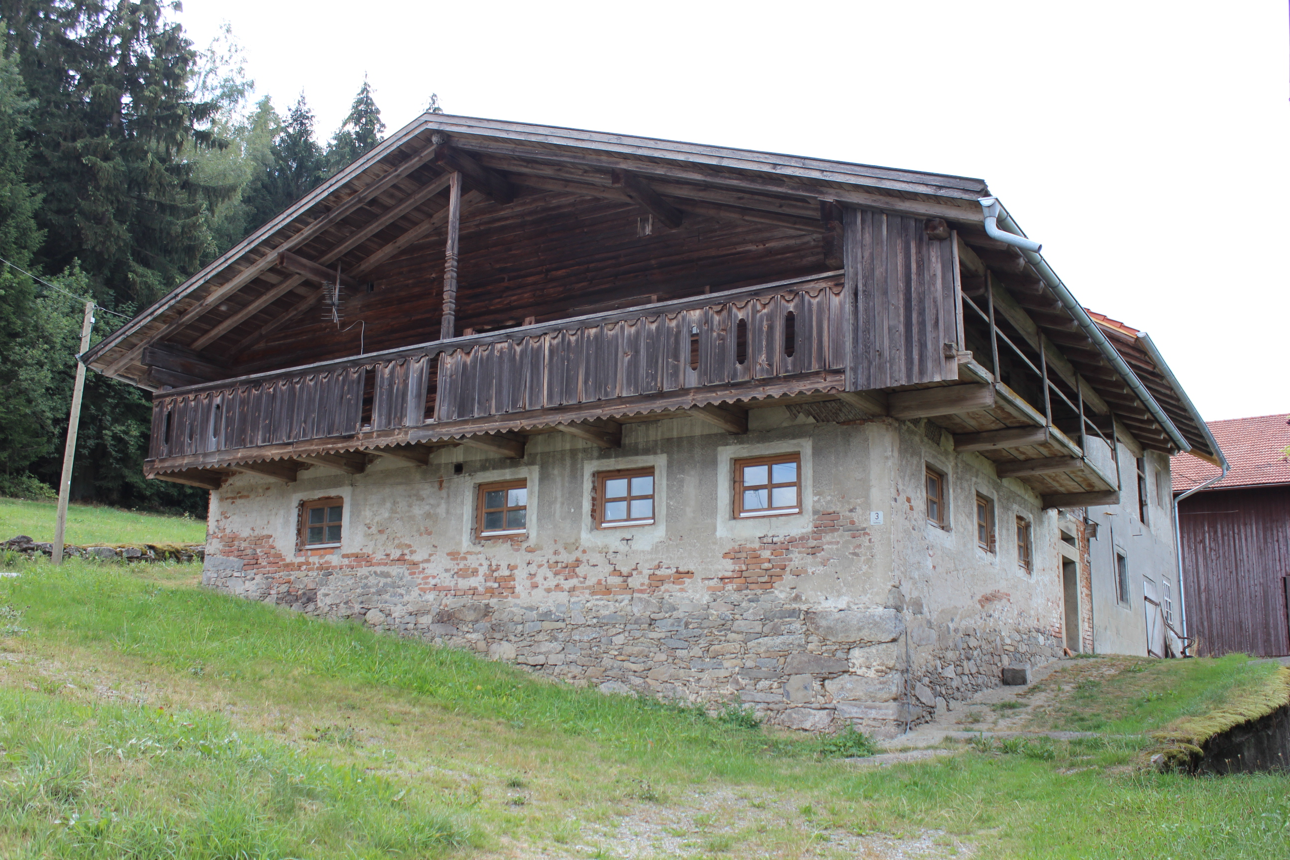 Bauernhaus mit Blockbau-Obergeschoss und umlaufenden Schrot; bezeichnet mit 1845 in Kellburg 3, Gemeinde Rattenberg.This is a photograph of an architectural monument.